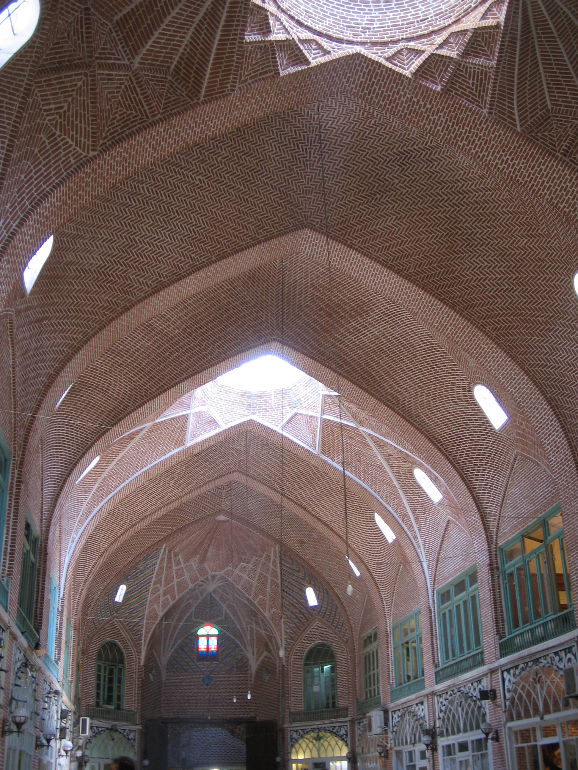 Tabriz - Carpet Bazaar